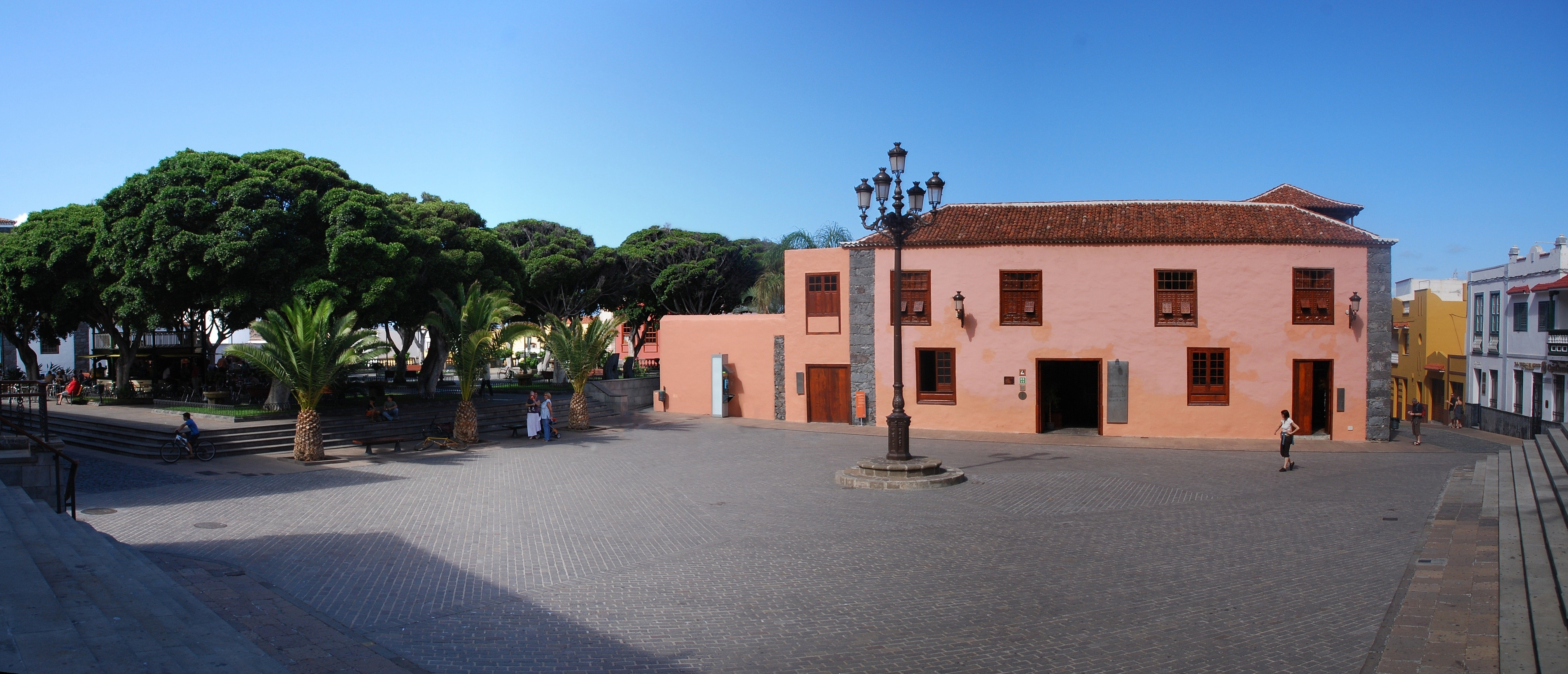 Marktplatz von Garachico, Teneriffa